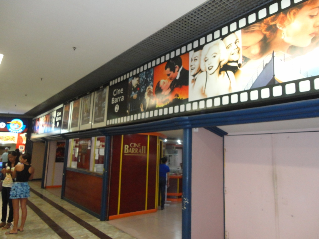 Vista lateral do Orient Cinemas Shopping Barra de Salvador, BA